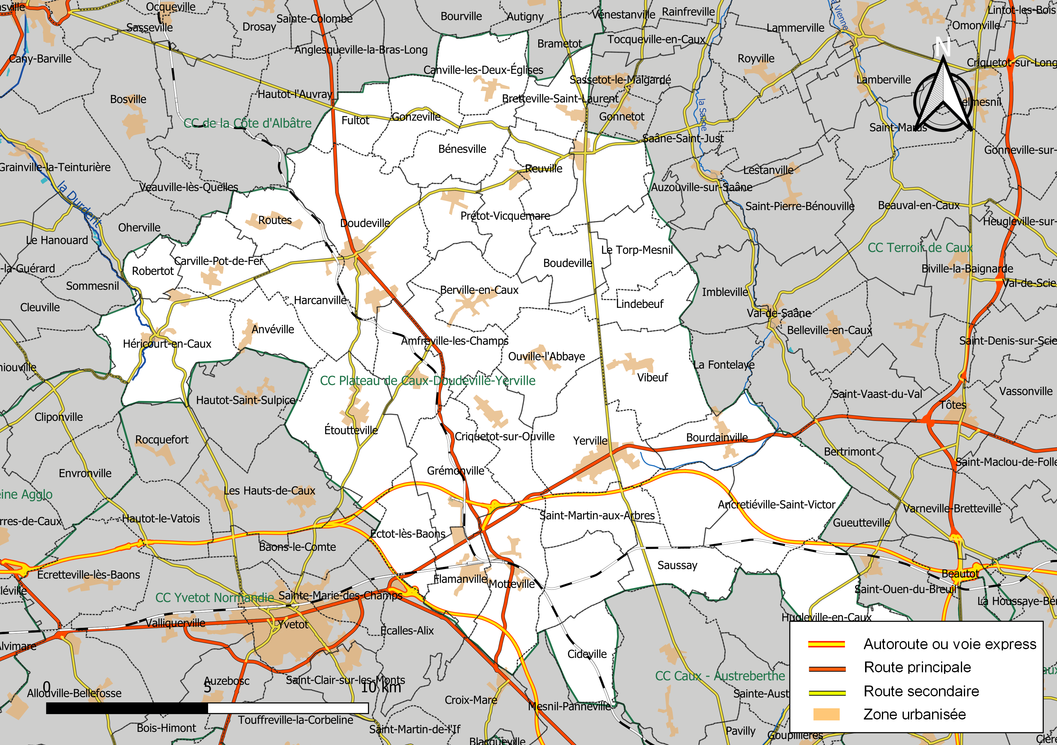 Carte géographique de la Communauté de communes Plateau de Caux-Doudeville-Yerville, département de la Seine-Maritime, France. Composition au 1er janvier 2019.